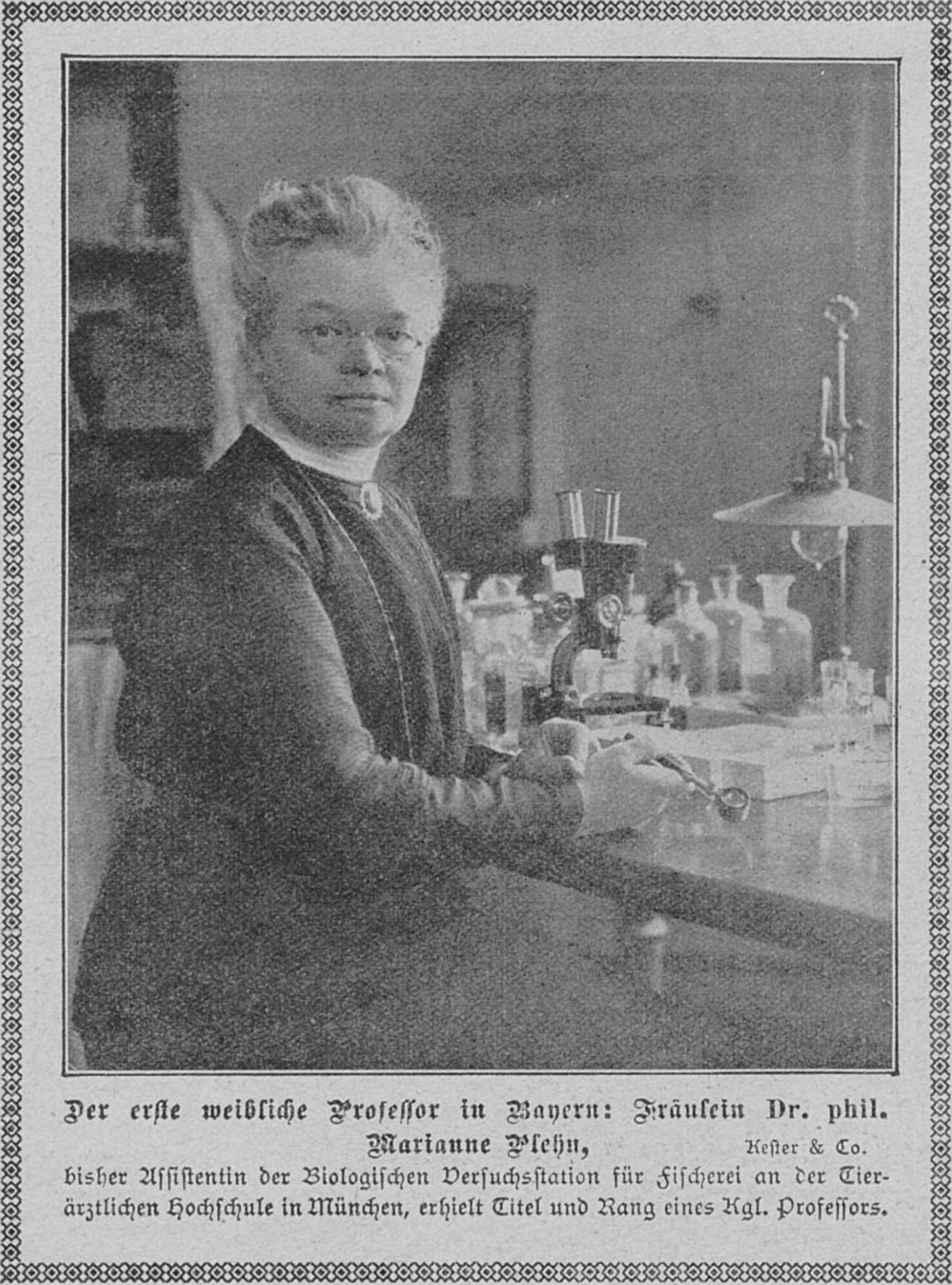 Der erste weibliche Professor in Bayern Fräulein Dr. phil. Marianne Plehn, Foto Kester & Co. 1914